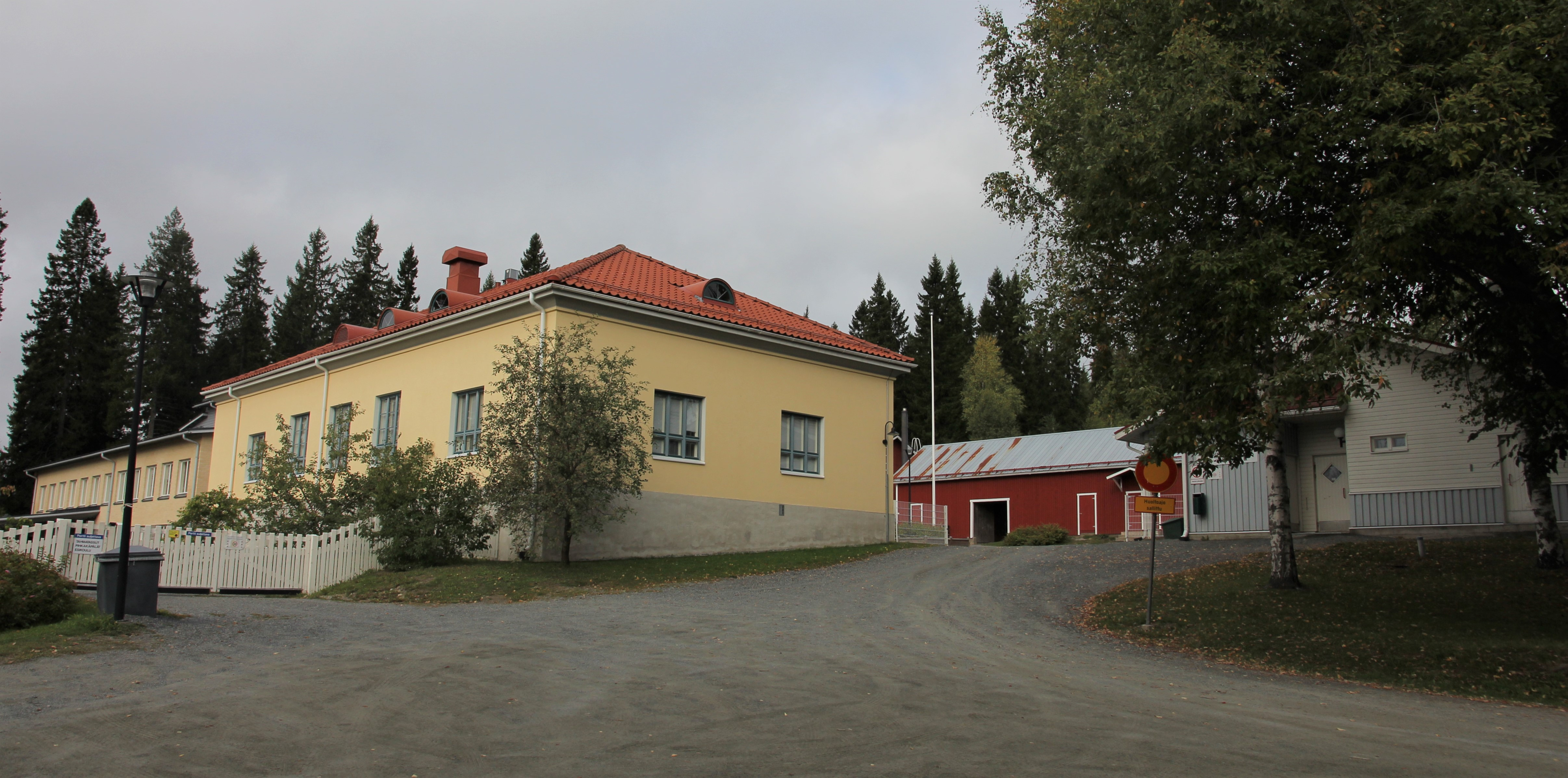 Pihkainmäen koulu on Pihkarinteentie 12:ssä, Kuopion Karttulan pitäjään kuuluvassa Pihkainmäen kylässä ja taajamassa toimiva peruskoulun alakoulu (luokka-asteet 1-6). (Koulun viereisessä rakennuksessa toimii päiväkoti.)